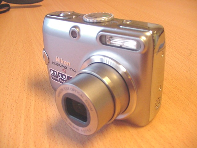 Appareil photographique numérique Nikon Coolpix P4 Vue de trois quart